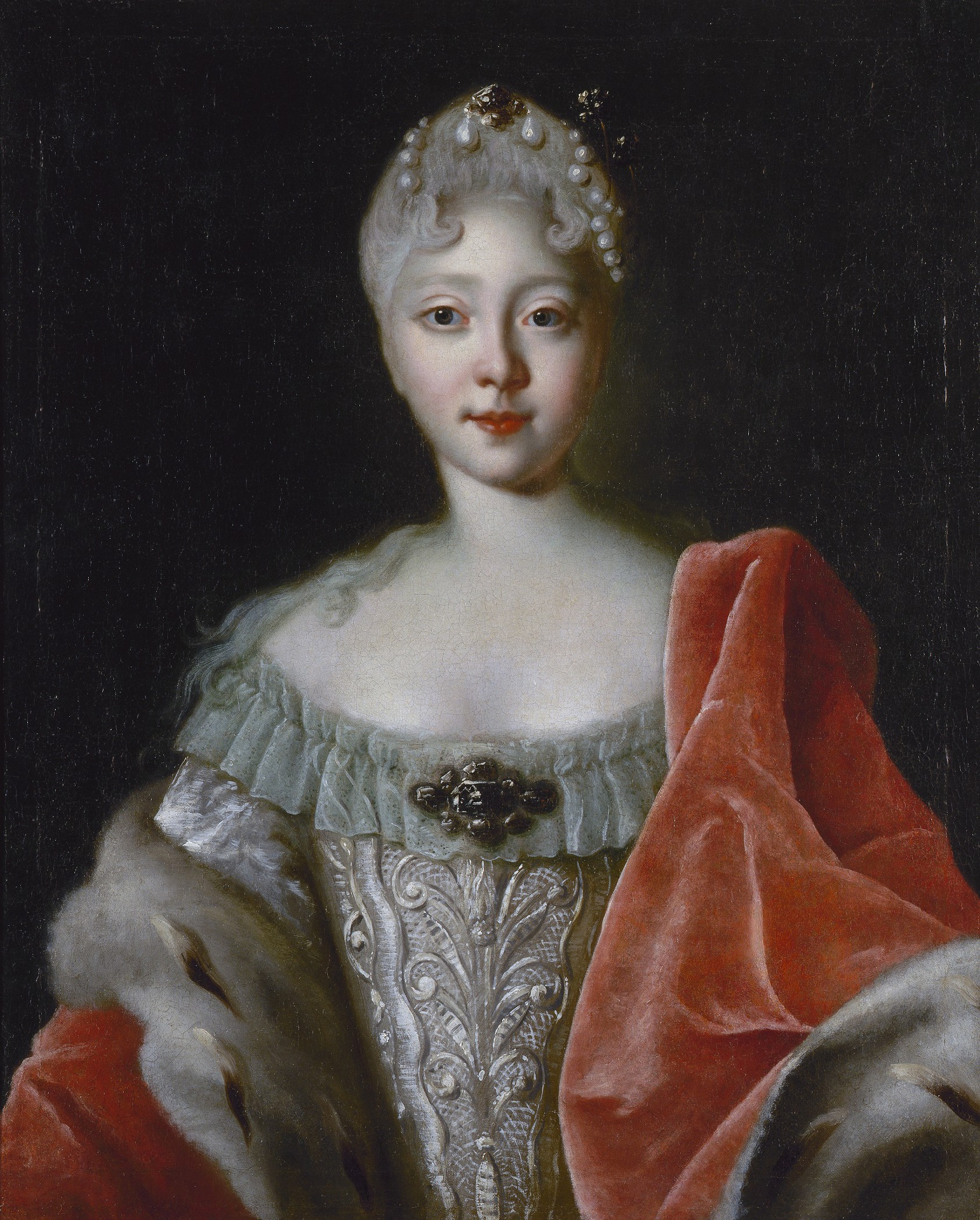 Portrait of Elizabeth Petrovna 1720s Louis Caravaque France Oil on canvas Портрет Елизаветы Петровны Холст, масло 78,0 х 63.0 см Поступление 1995, через ЭЗК Инв No ЭРЖ-3268 Портрет поступил в ГЭ как работа Ивана Никитина. Oднако после - Вязьменская Л.П., Новая атрибуция: портрет Елизаветы Петровны кисти Каравакка, 1998 - ГЭ кажется изменил атрибуцию